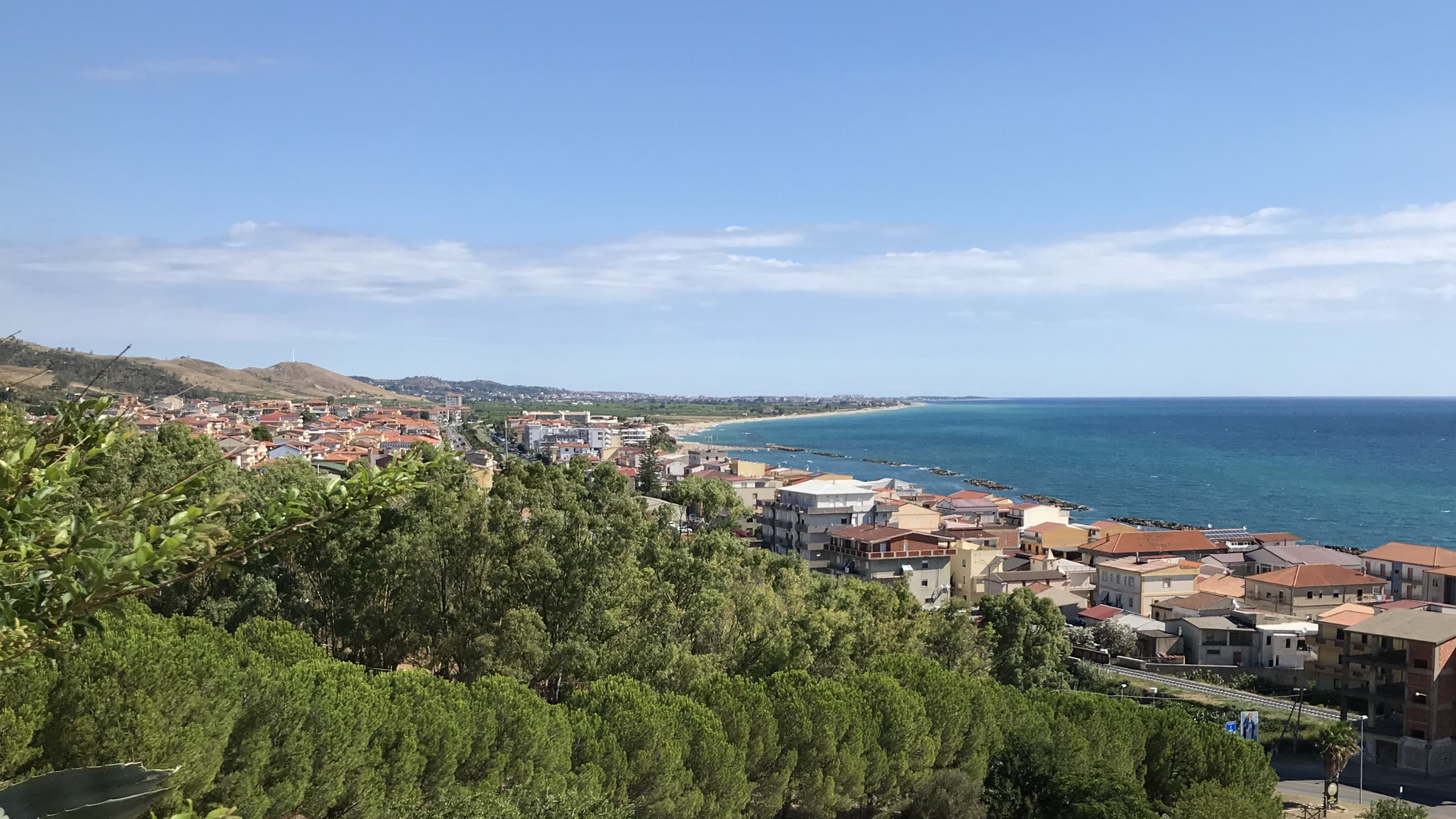 Panorama di Torre Melssai